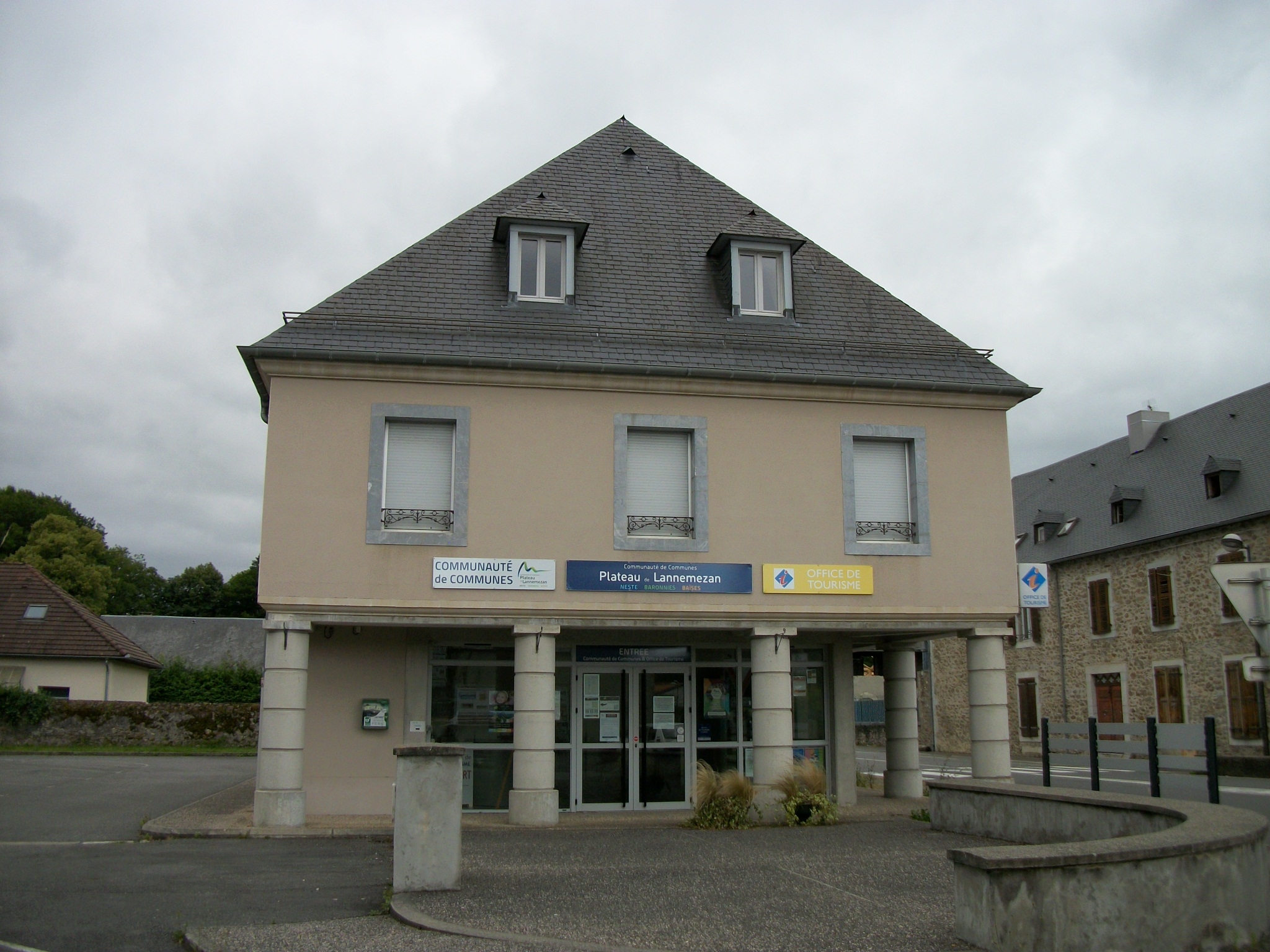 La Barthe-de-Neste